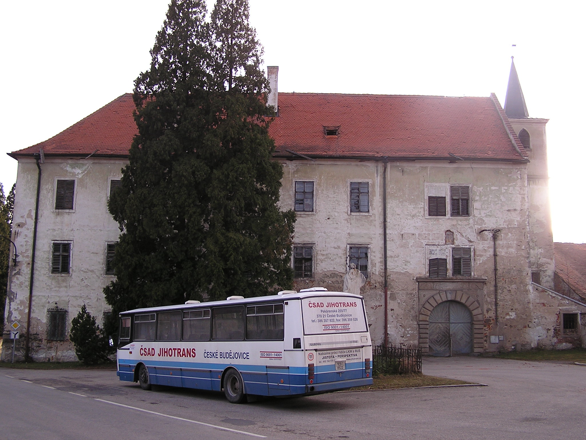 Komařický zámek